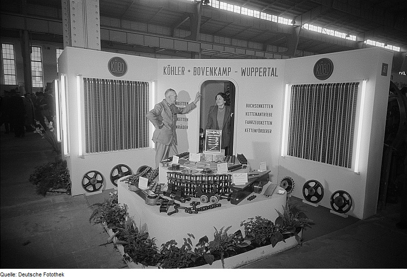 Original image description from the Deutsche Fotothek Stand für Antriebsketten der Firma Köhler & Bovenkamp auf der Leipziger Herbstmesse 1954